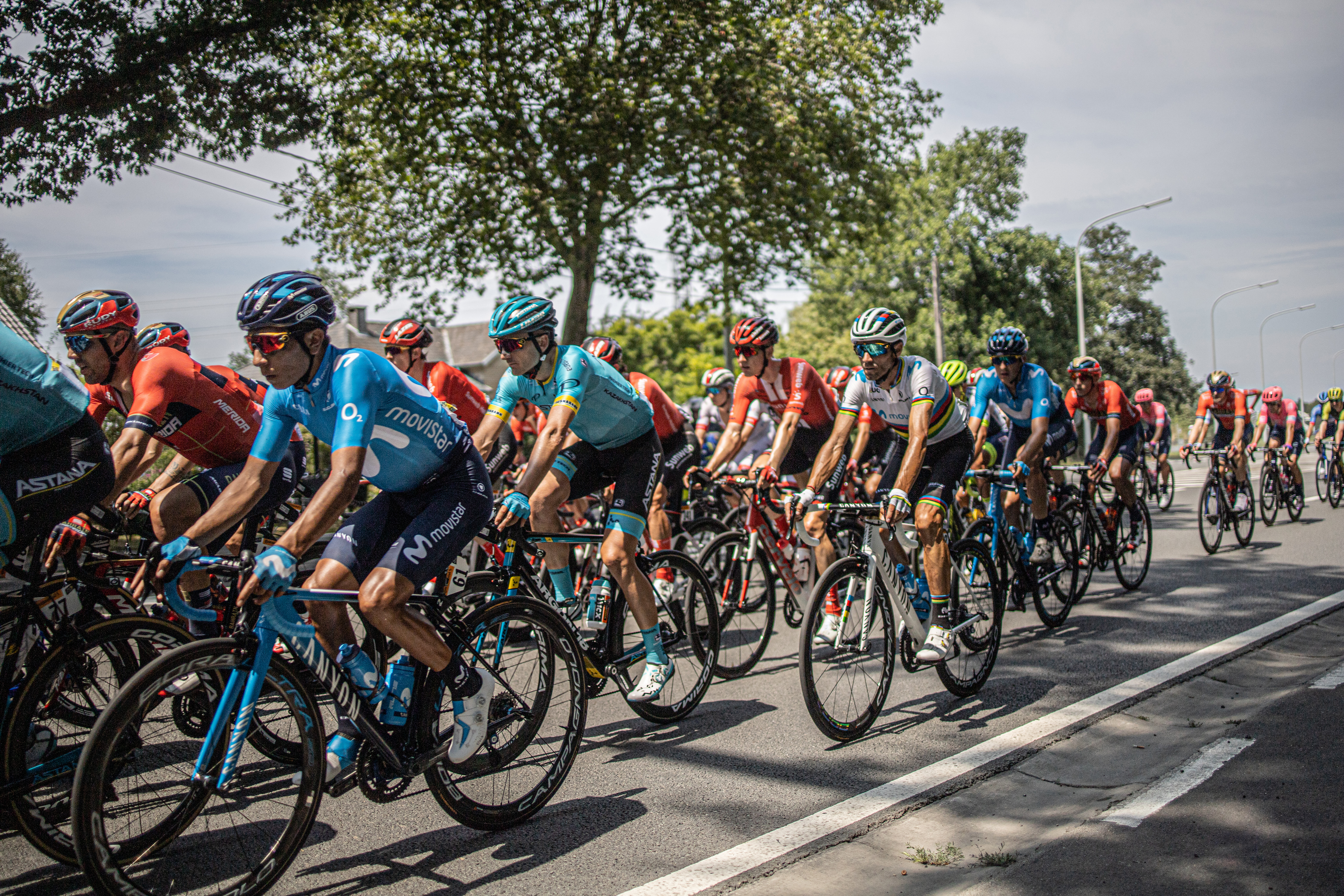 Le Tour de France 2019 passera trois jours en Belgique avant de rejoindre l’Hexagone. A l’occasion de la première étape, le peloton traversera Enghien ! Peloton während der ersten Etappein Enghien